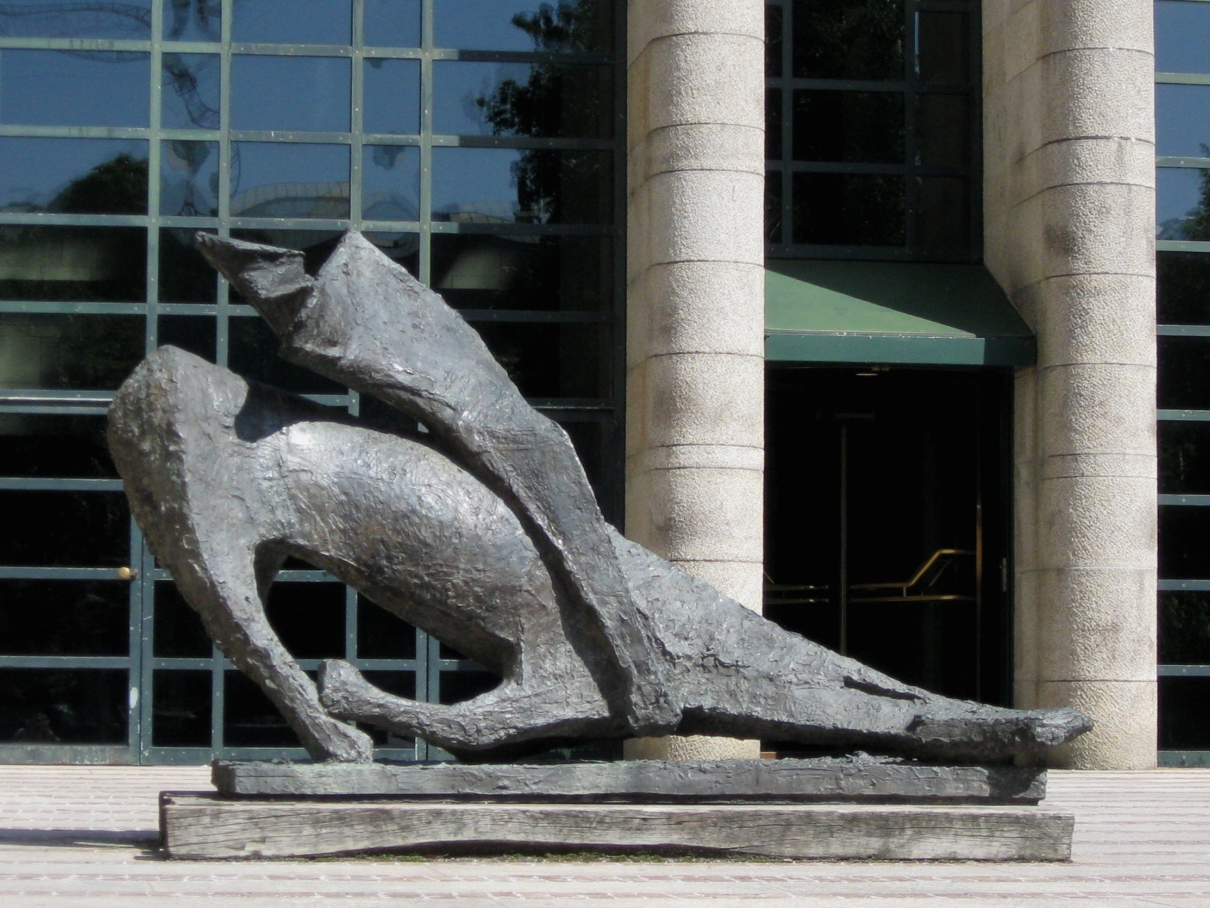 Marino Marini: Miracolo, 1959-60, Neue Pinakothek München